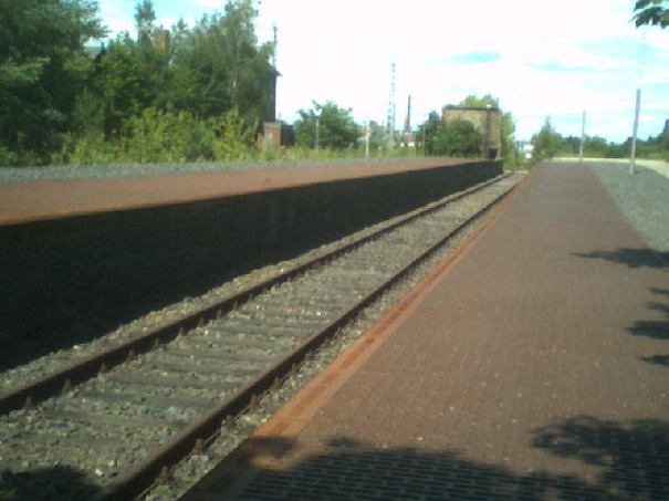 האנדרטה ברציף 17 בתחנת הרכבת של גרונוולד - מקור ויקפדיה בגרמנית